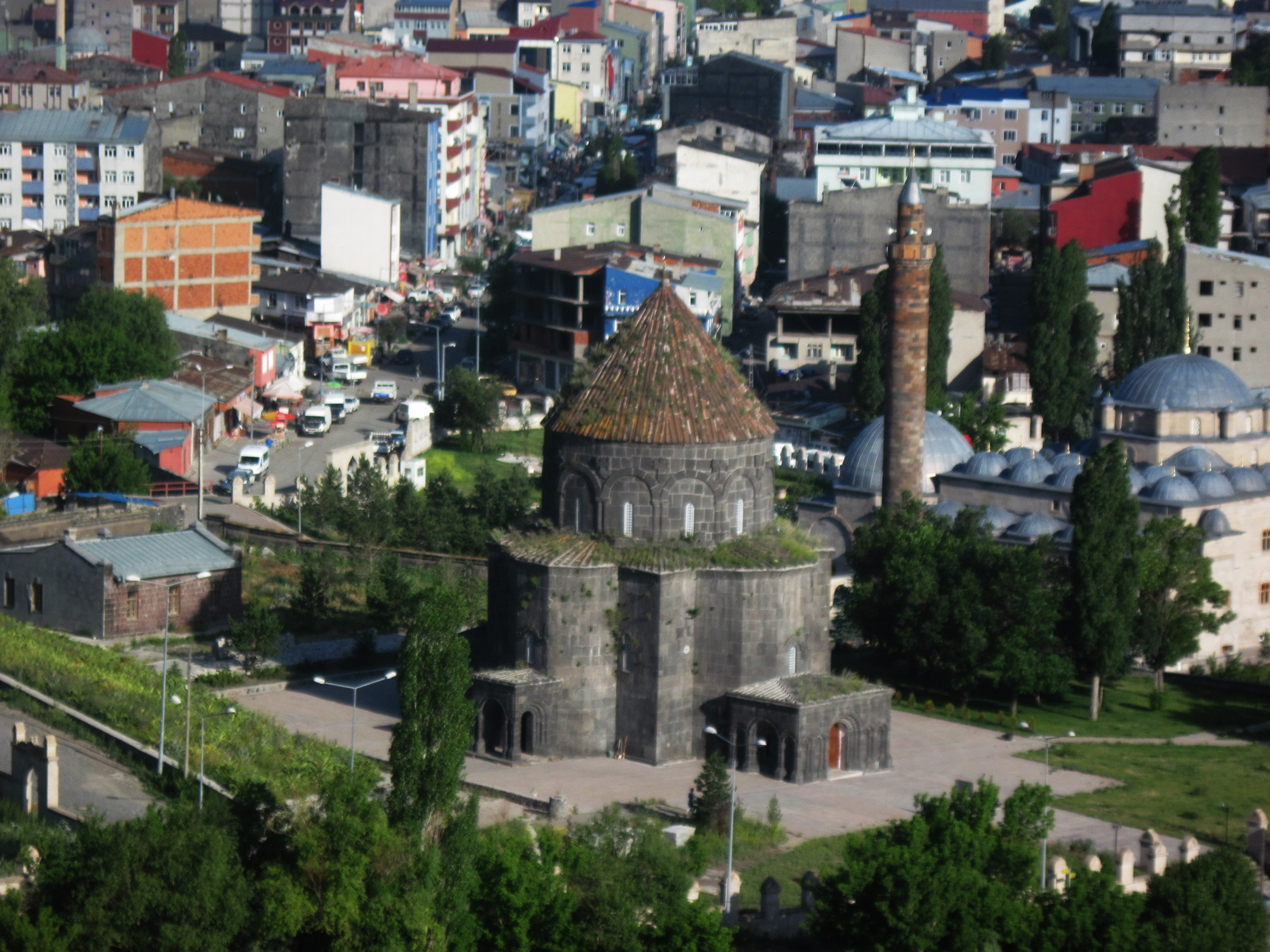 Սուրբ Առաքելոց եկեղեցին